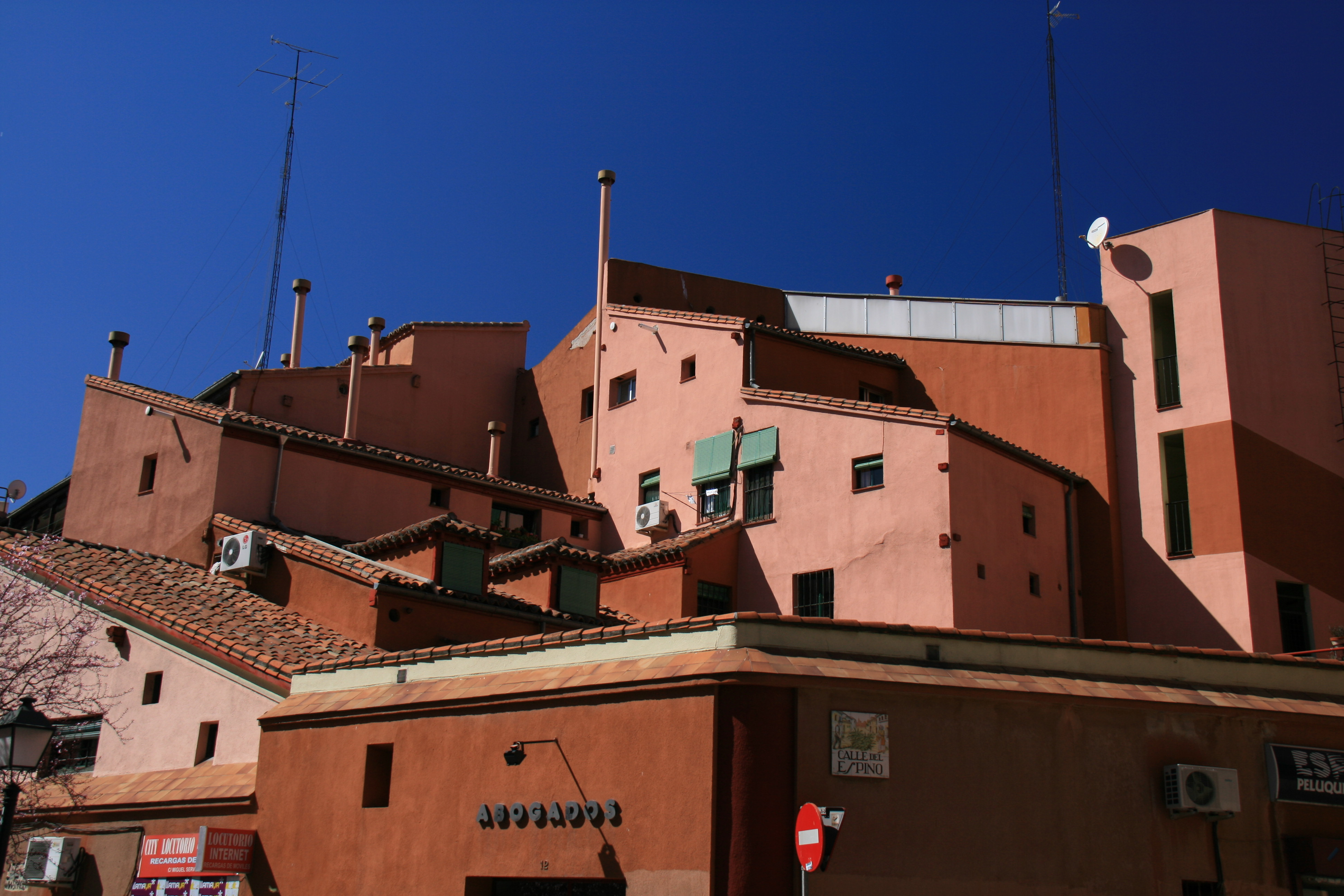 Lavapies - Corralas